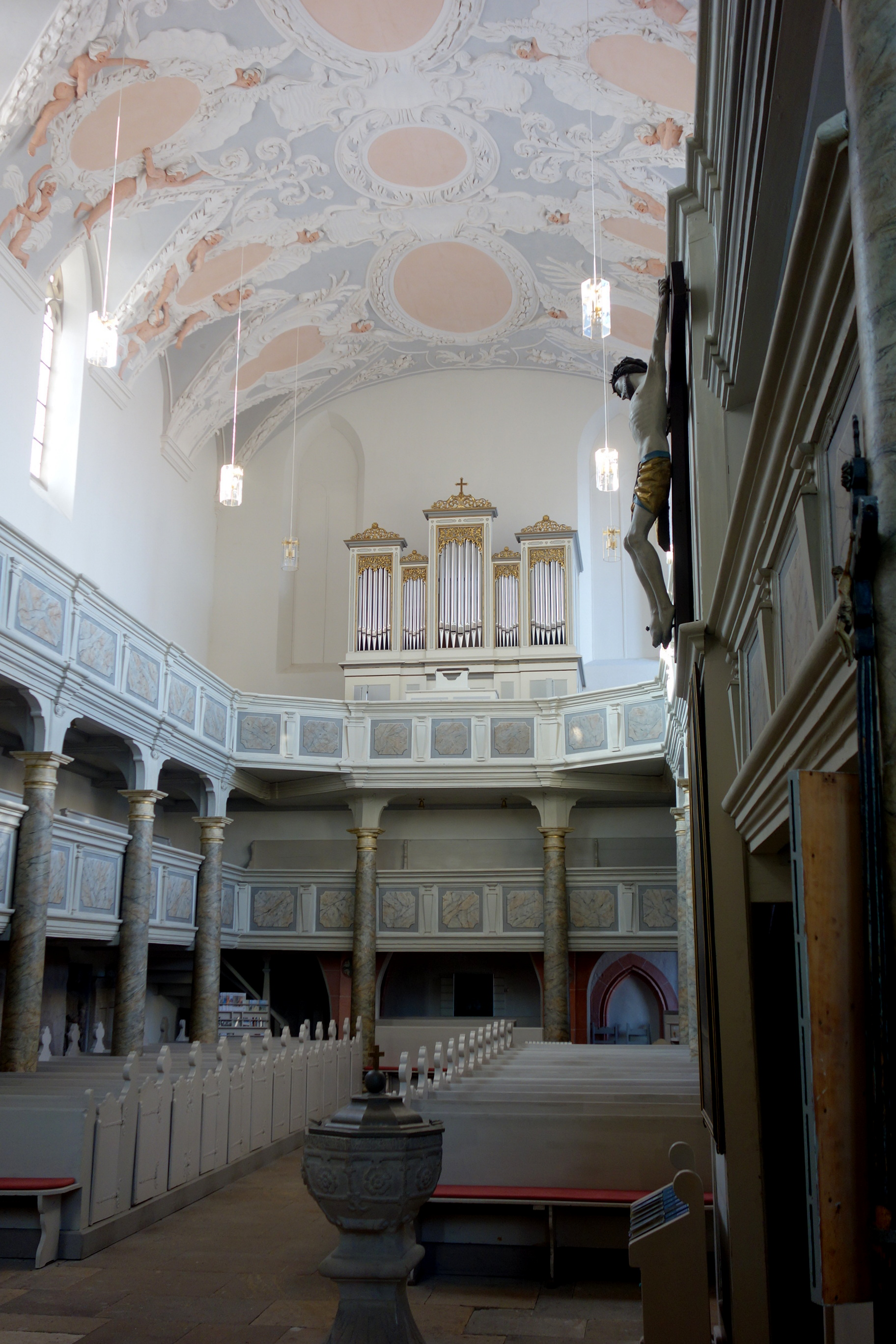 Orgel der Klosterkirche Himmelkron, Landkreis Kulmbach, Deutschland